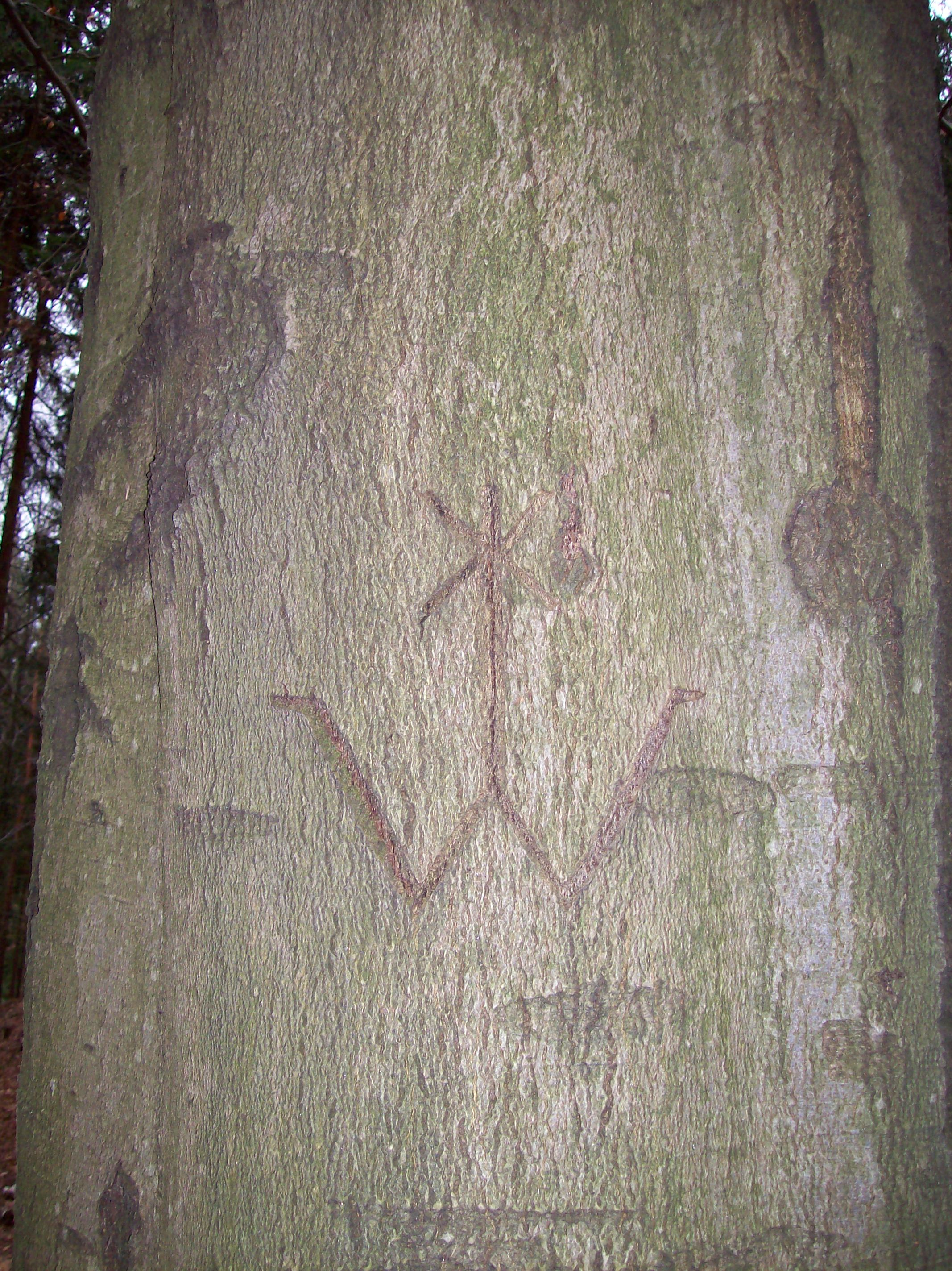 Waldzeichen Fürstenweg Tharandter Wald